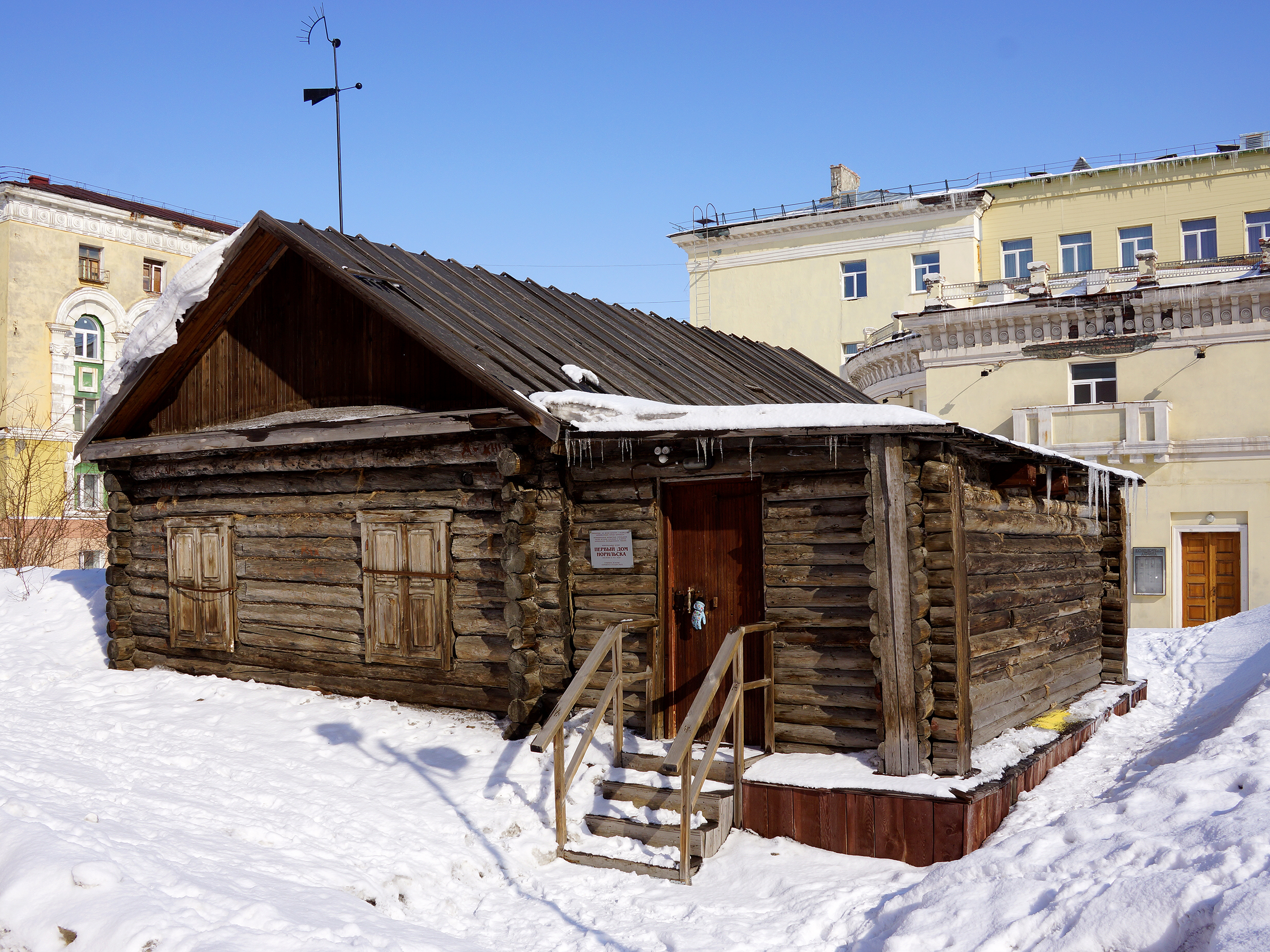 Первый дом Норильска: проспект Ленинский, 14, Норильск, Красноярский край